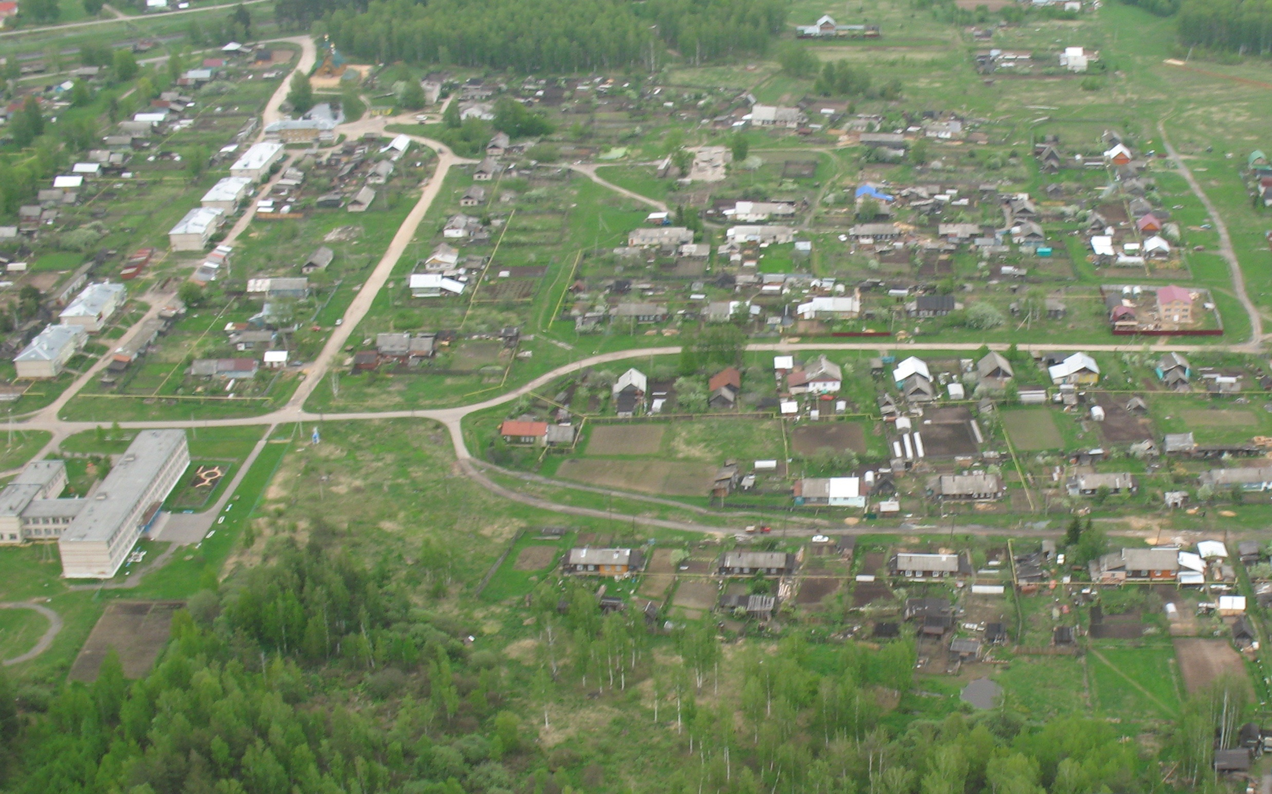 Под крылом Денисово